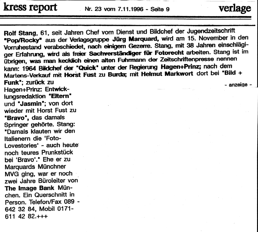 Kress-Report Nr. 23 vom 07.11.1996, Seite 9